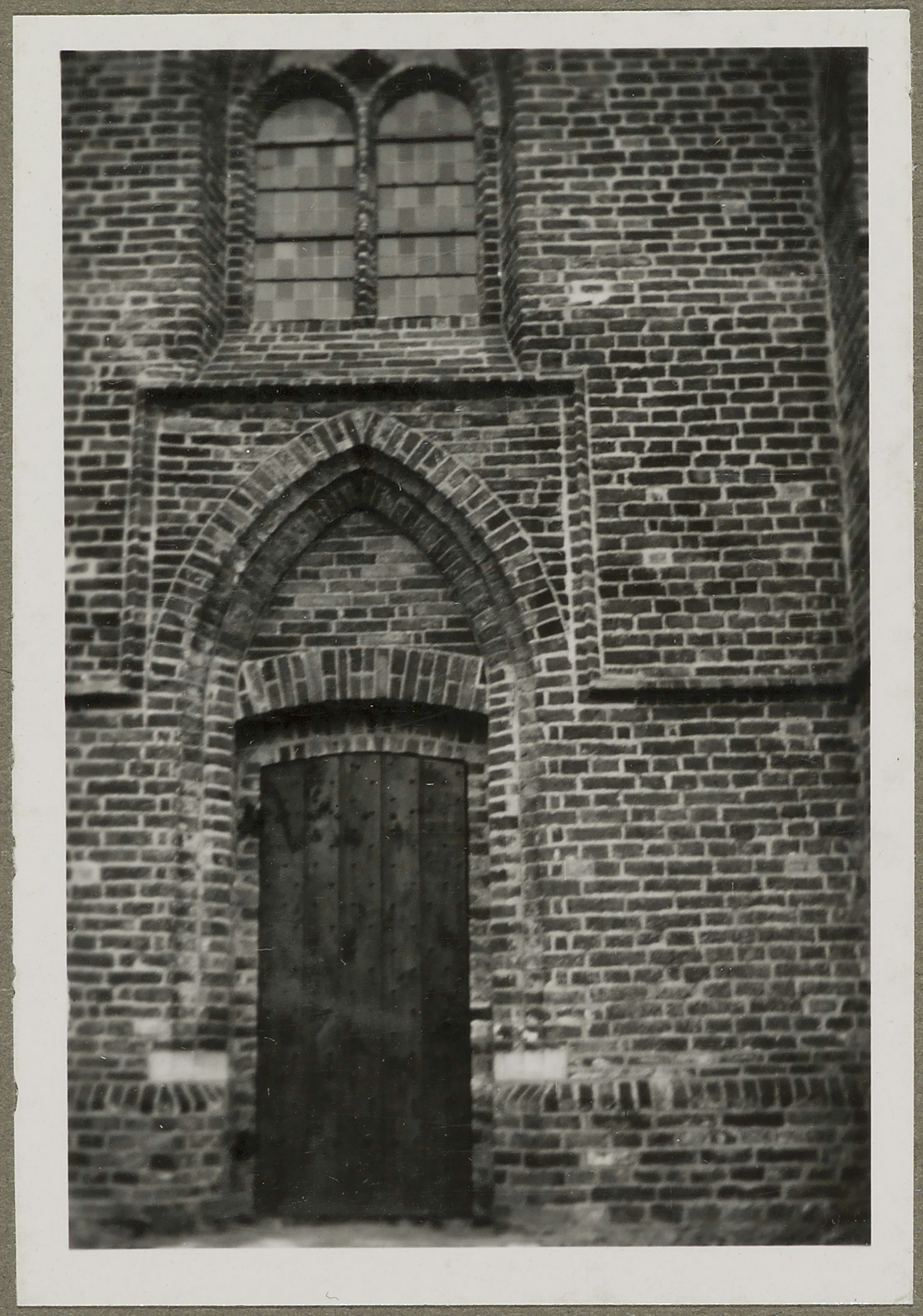 Nederlands Hervormde Kerk: Deur noordgevel